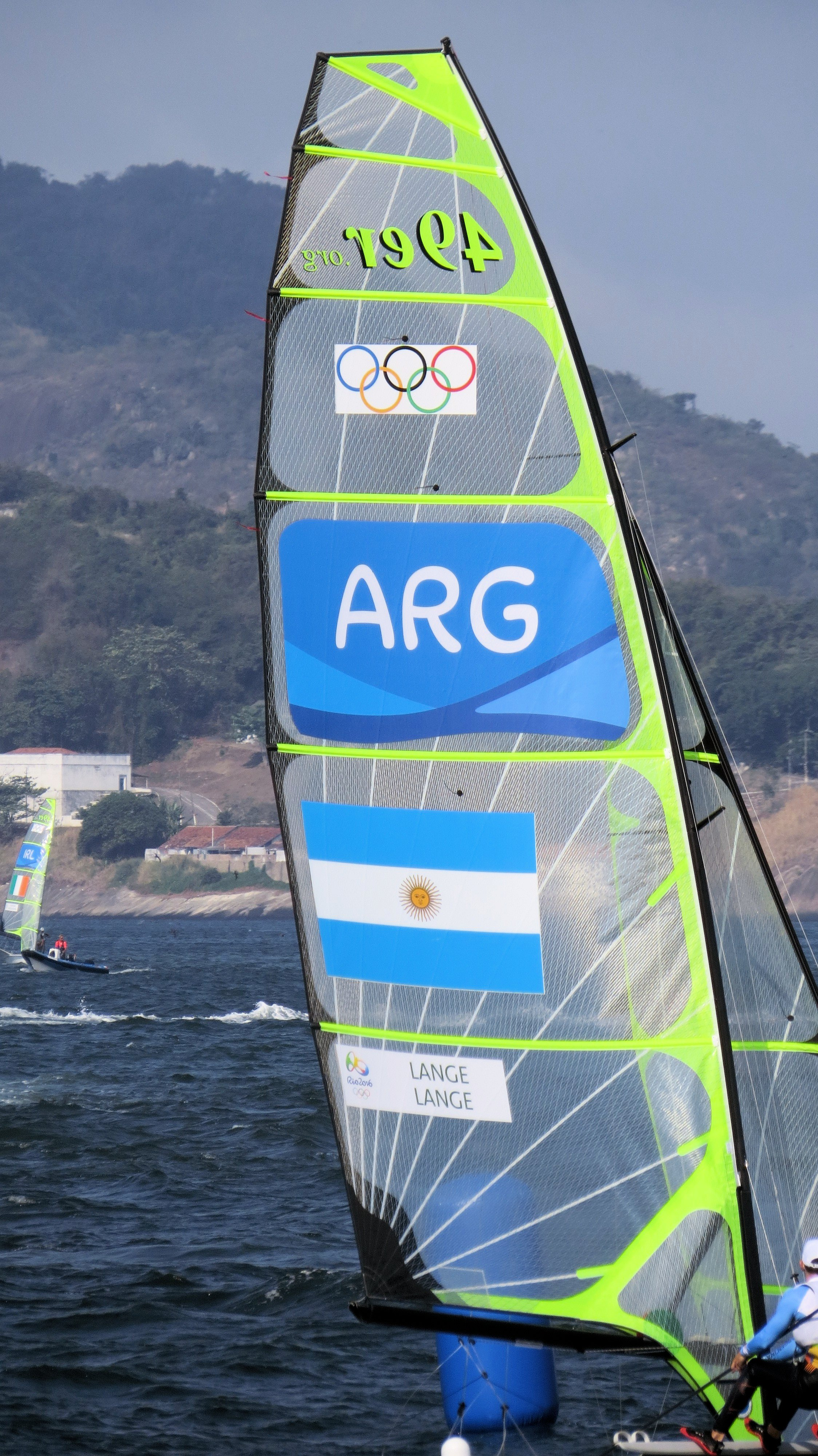 sx50